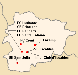 Répartition des clubs en Primera Divisio 2002-2003.